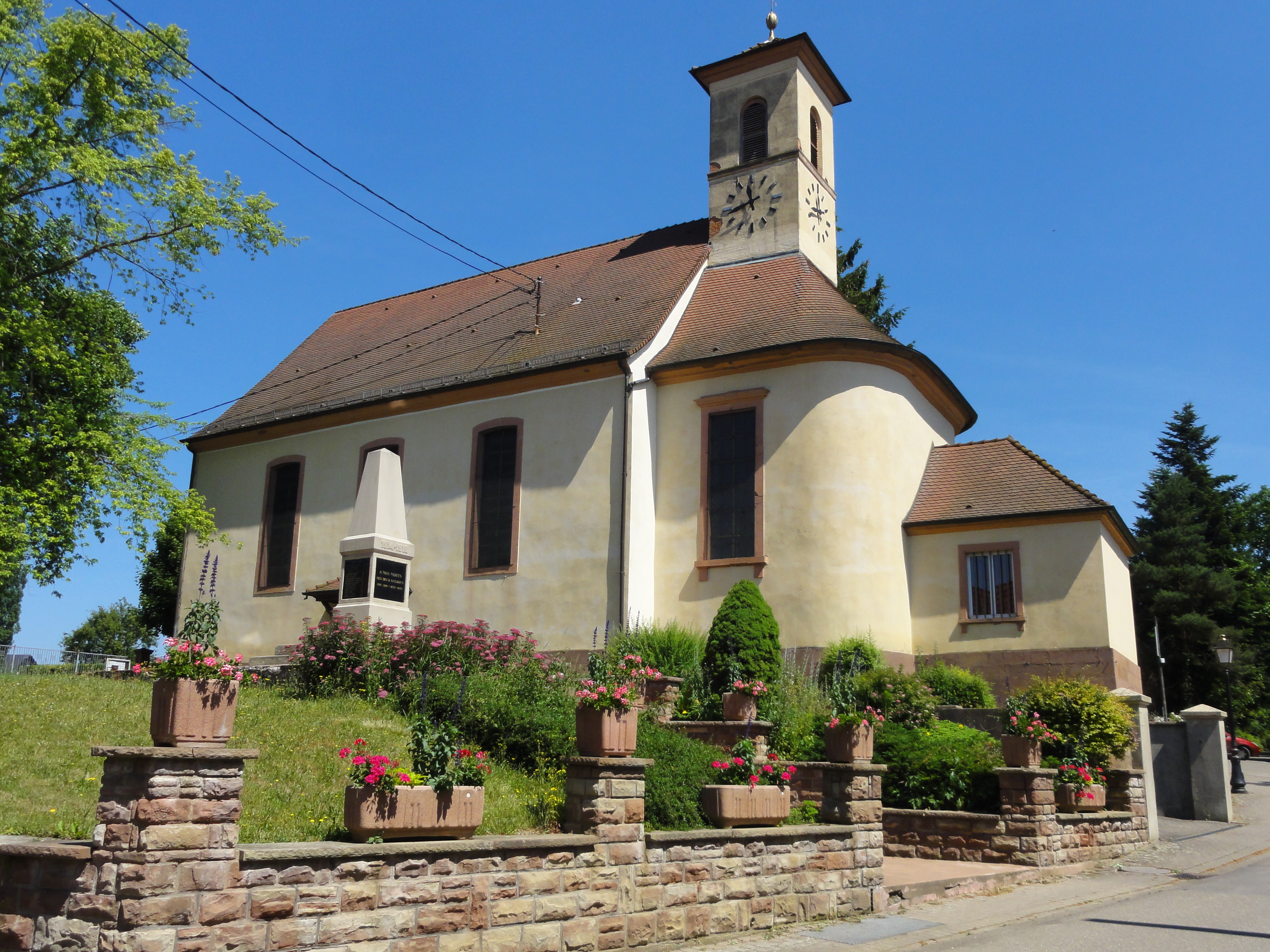 Alsace, Bas-Rhin, Kurtzenhouse, Église simultanée Saint-Michel